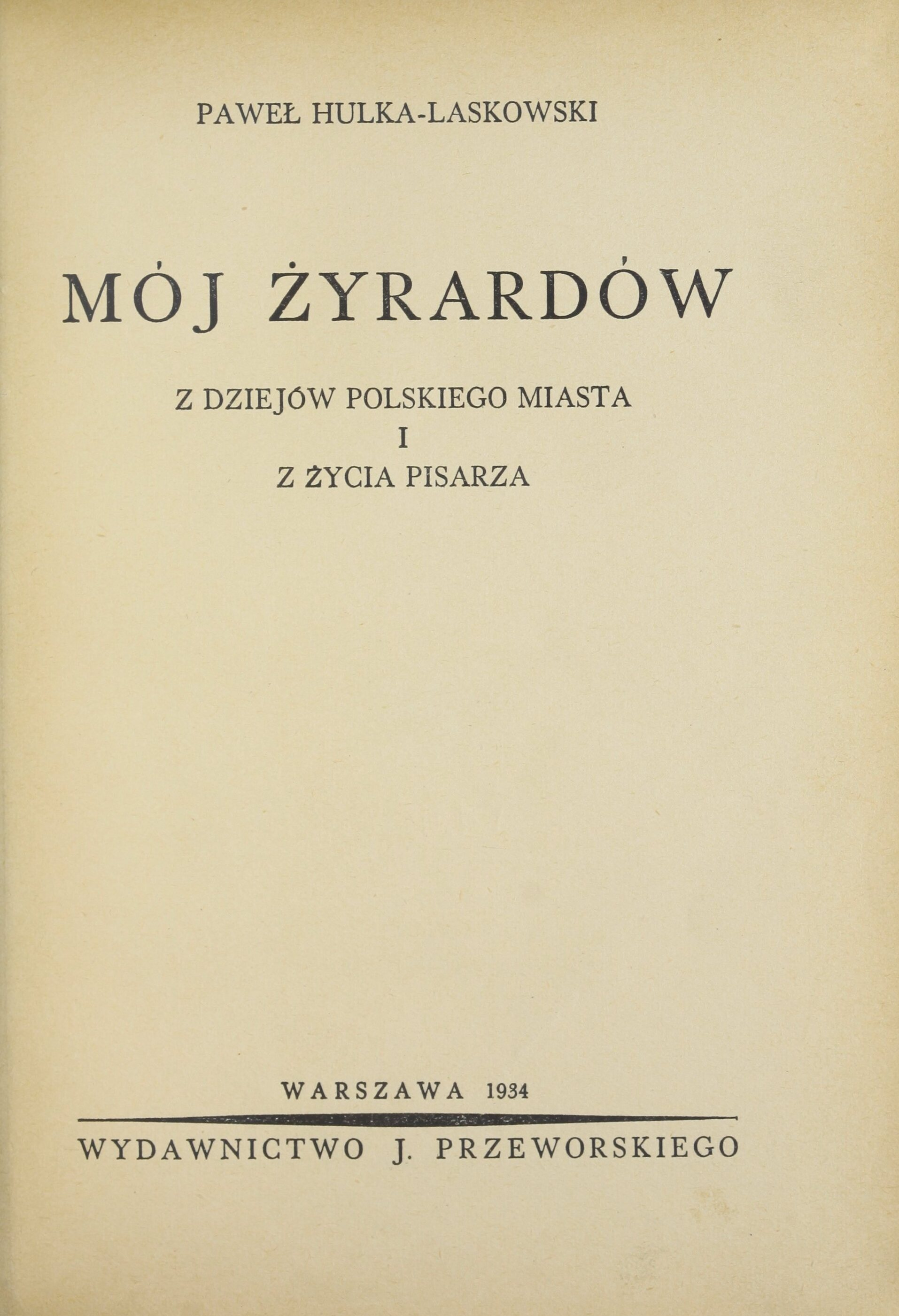 Mój Żyrardów : z dziejów polskiego miasta i z życia pisarza